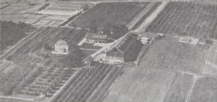 Gården Grette i Lier i Buskerud.